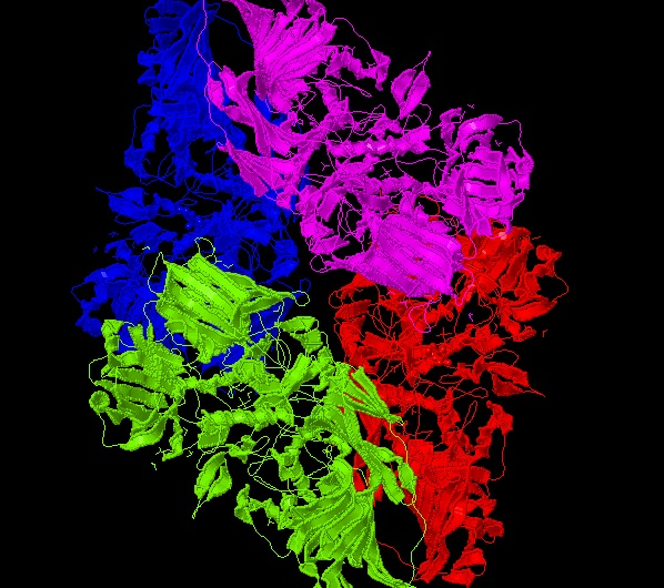 Neli identset polüpeptiidahelat